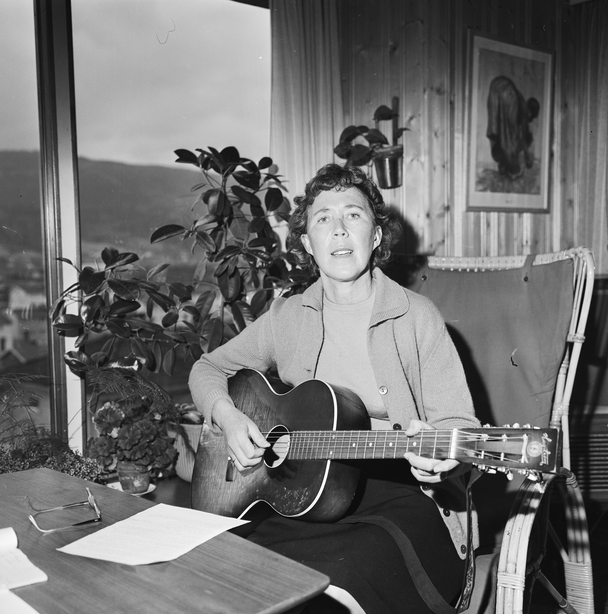 Kirsten Langbo var en norsk forfatter og barneunderholder.